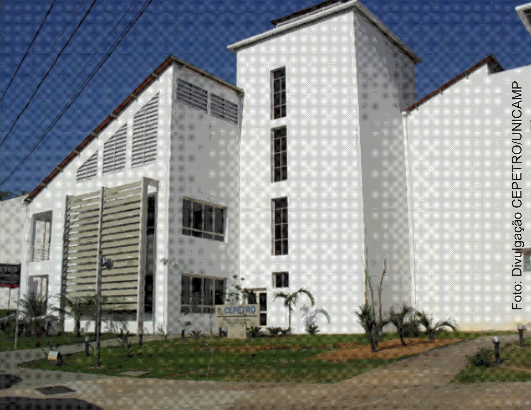 Fachada do Centro de Estudos de Petróleo, localizado na Universidade Estadual de Campinas.